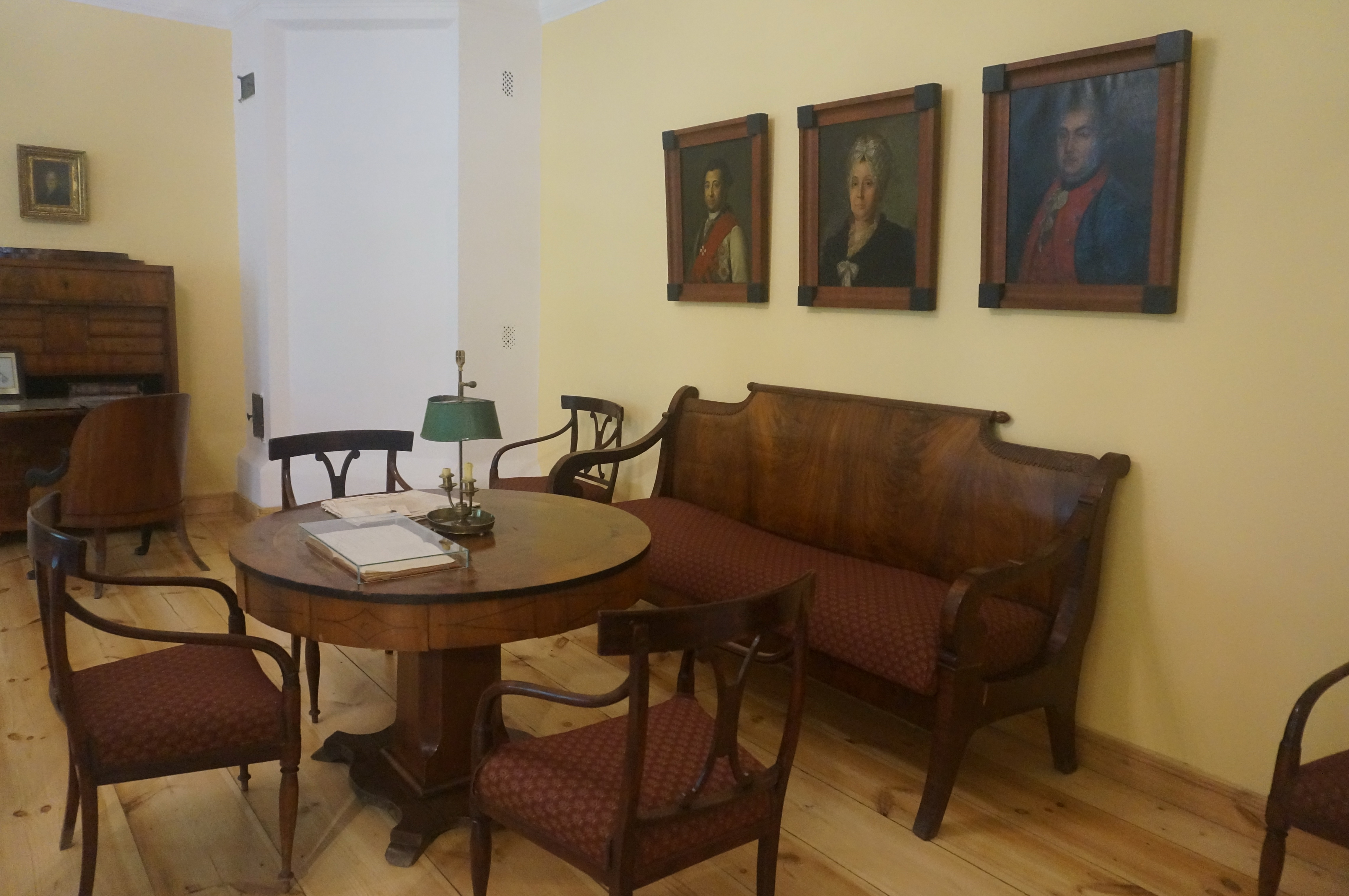 Зальце. Господский дом. Музей-заповедник А. С. Пушкина «Болдино»